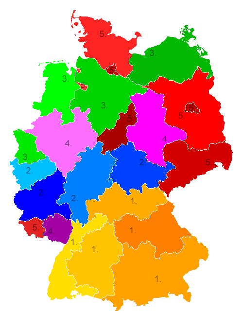 Die 24 Oberlandesgerichte in den 16 Bundesländern und die 5 zuständigen Strafsenate des Bundesgerichtshofs, ab 2012